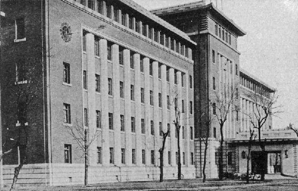 中文（中国大陆）: 奉天满铁铁道总局